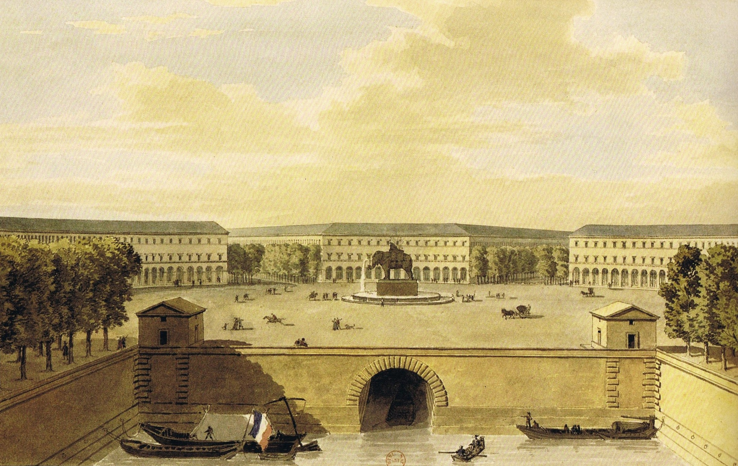 Projet d'aménagement de la place de la Bastille sous le Consulat et l'Empire.